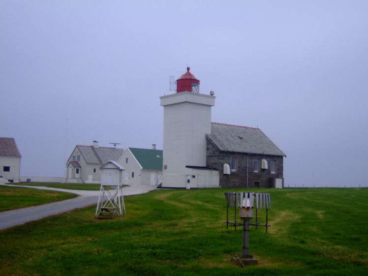 Obrestad Light house